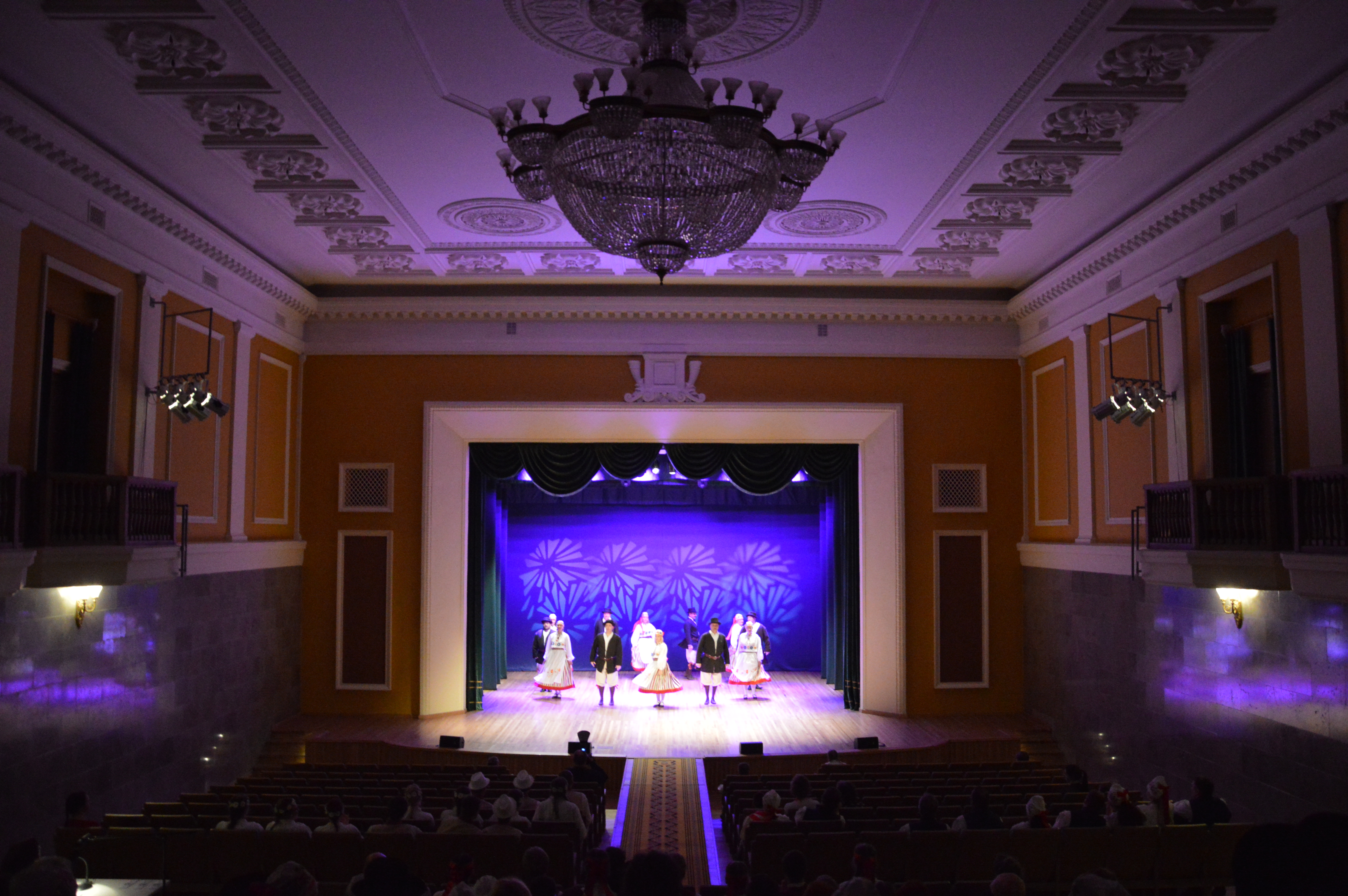 Kohtla-Järve Kultuurimaja.